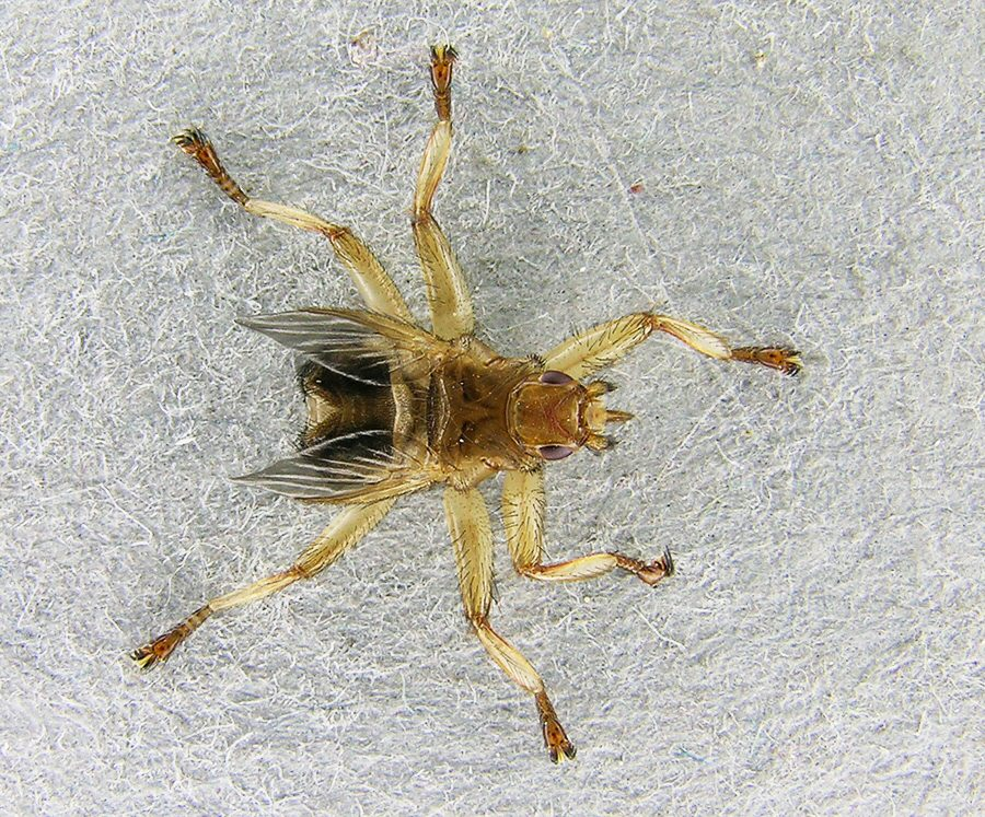 Crataerhina pallida